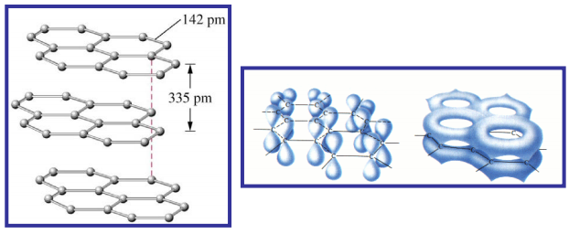 Grafitoaren egitura